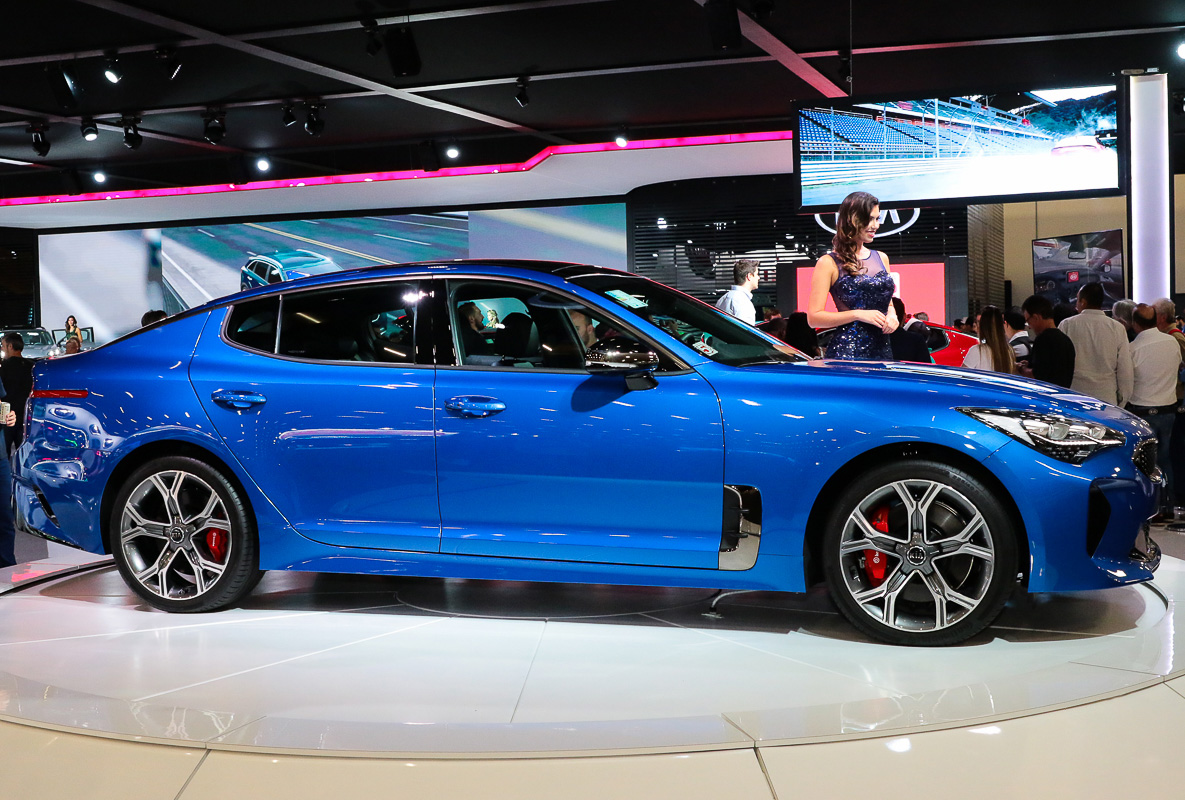 Salão do Automóvel 2018